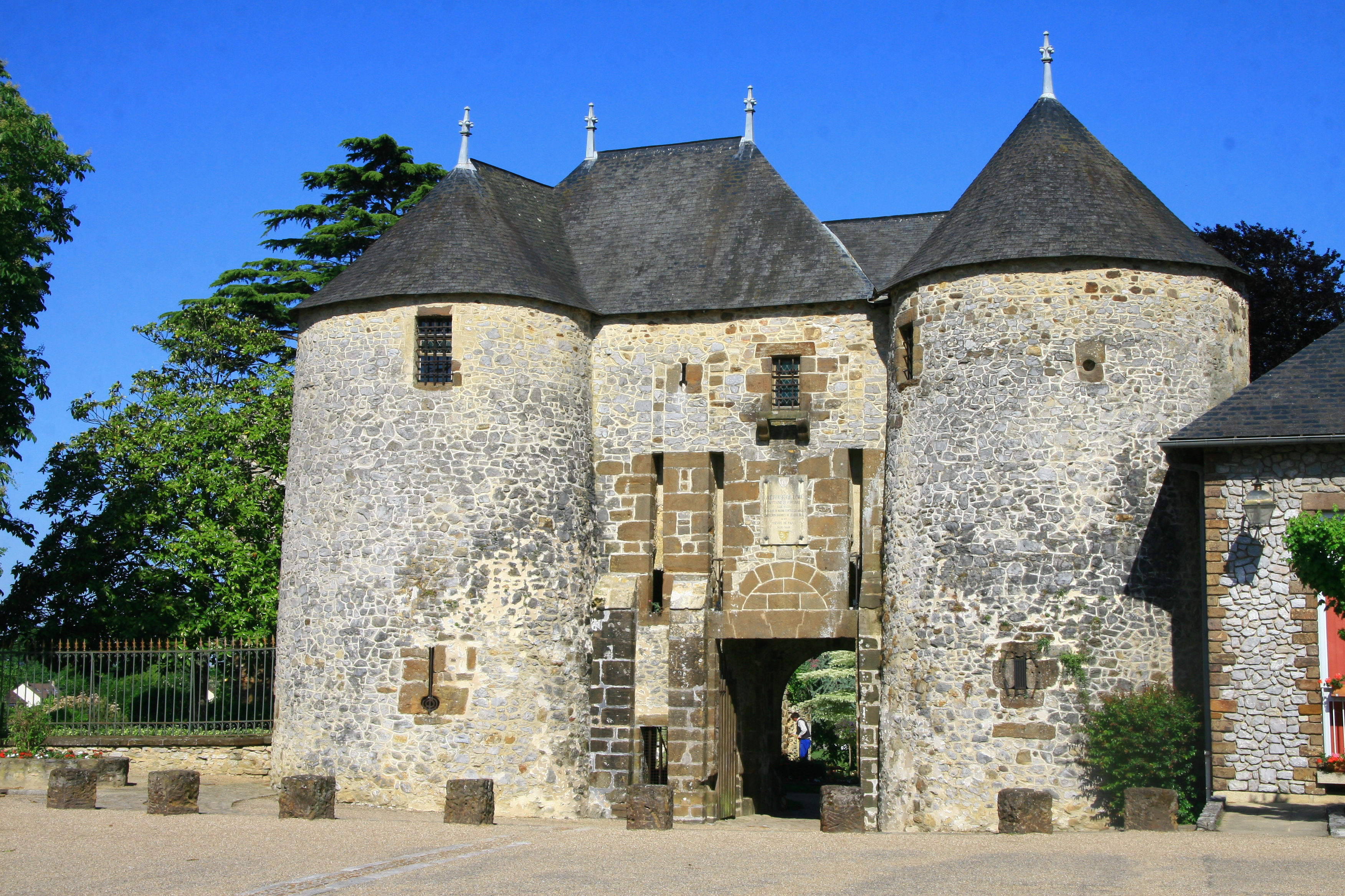 Château de Fresnay-sur-Sarthe entrée du parc, Sarthe, Pays de la Loire, France